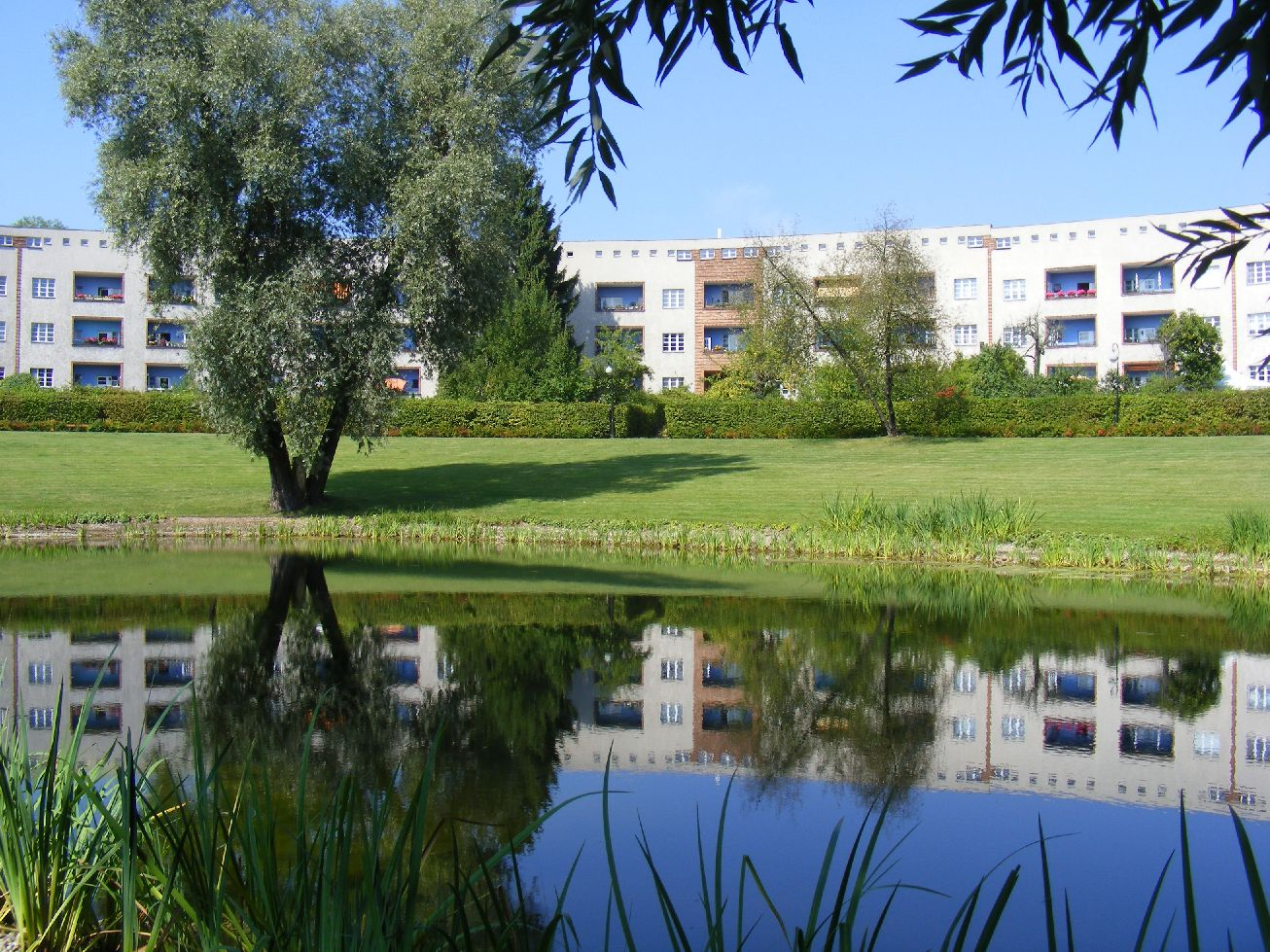 Bruno Taut, Hufeisensieddlung, Britz, Berlin